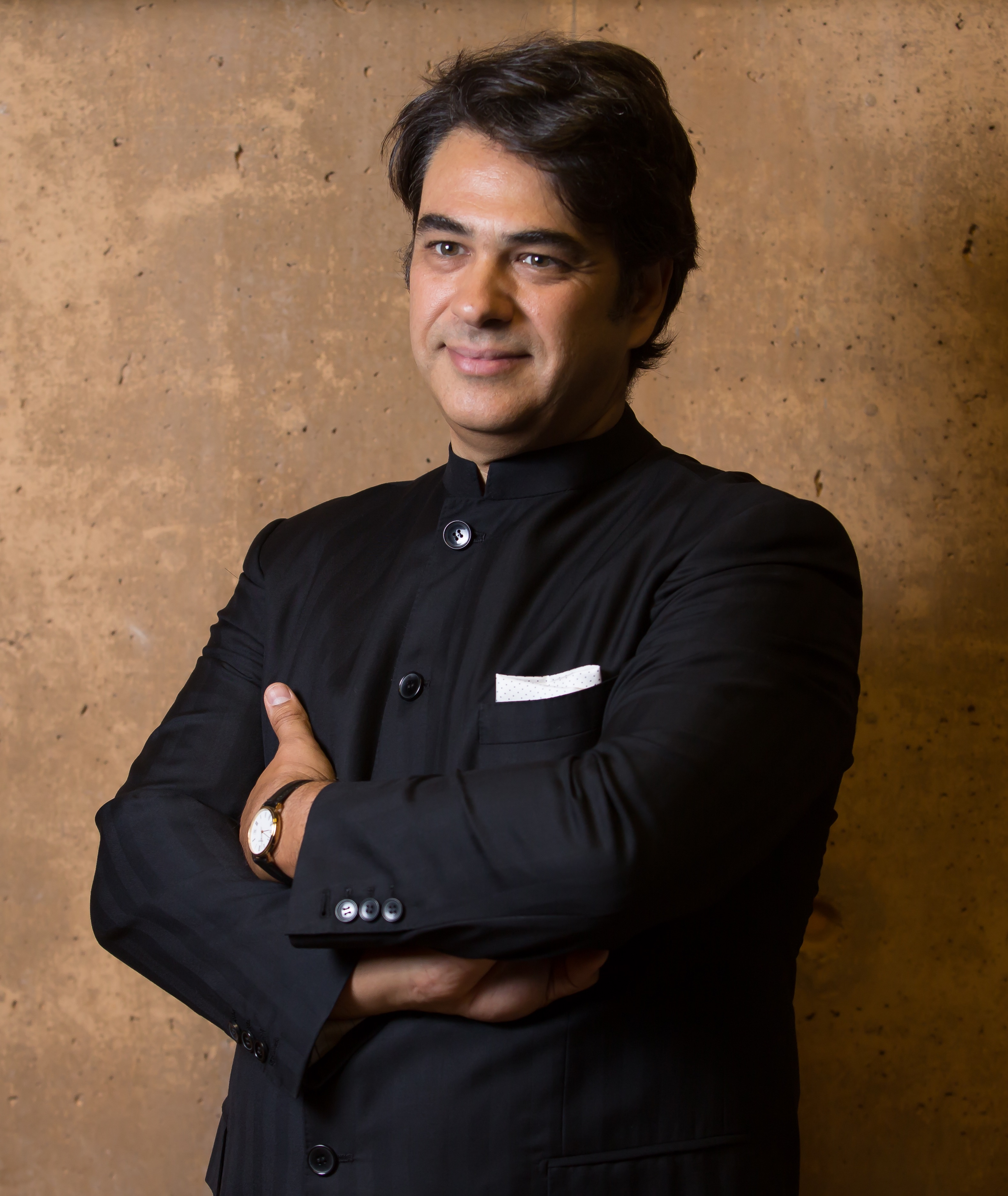 PedroAmaral, 2016